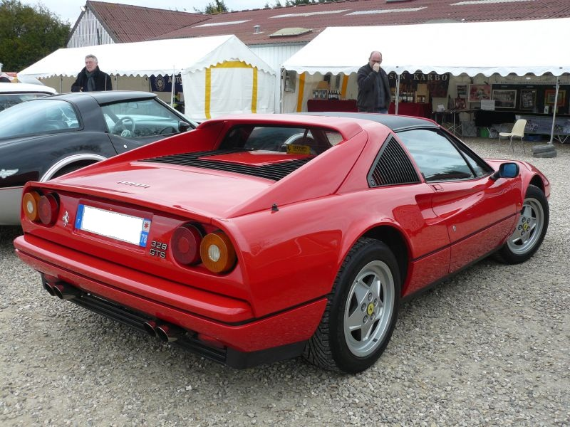 Mantes la Jolie 2012